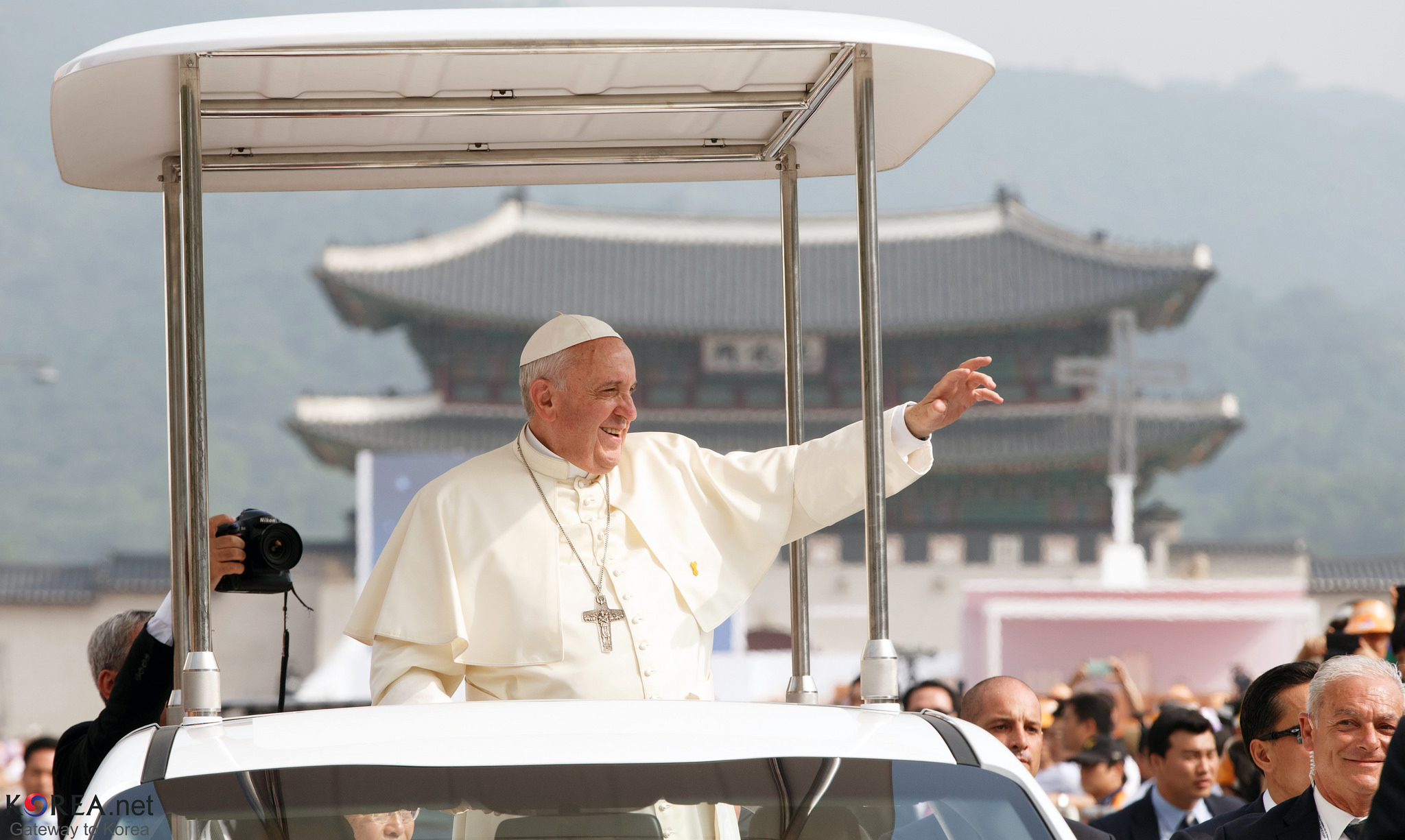 Le pape François en Papamobile lors de son Voyage en corée du Sud en 2014